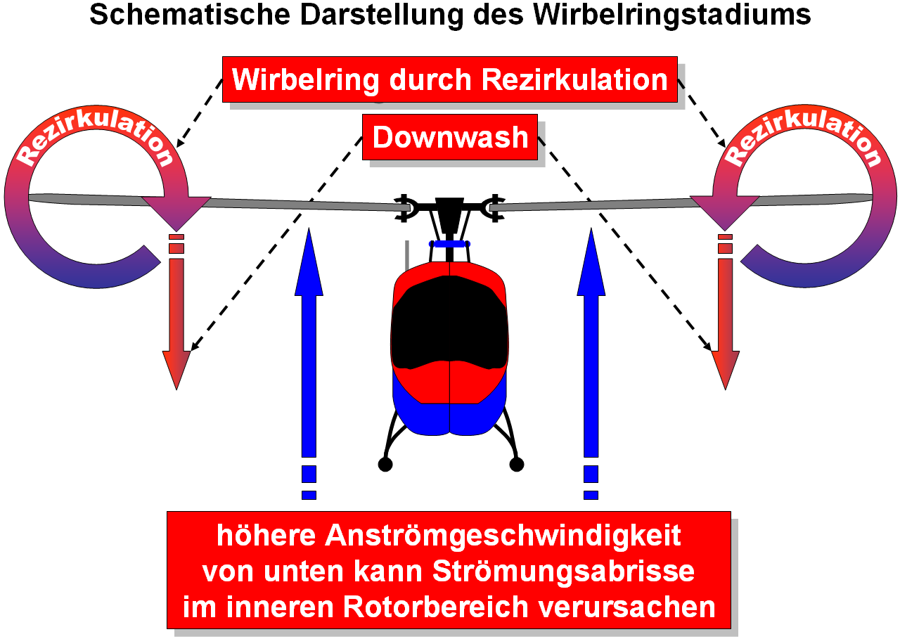 Schematische Darstellung des Luftdurchsatzes im Sinkflug